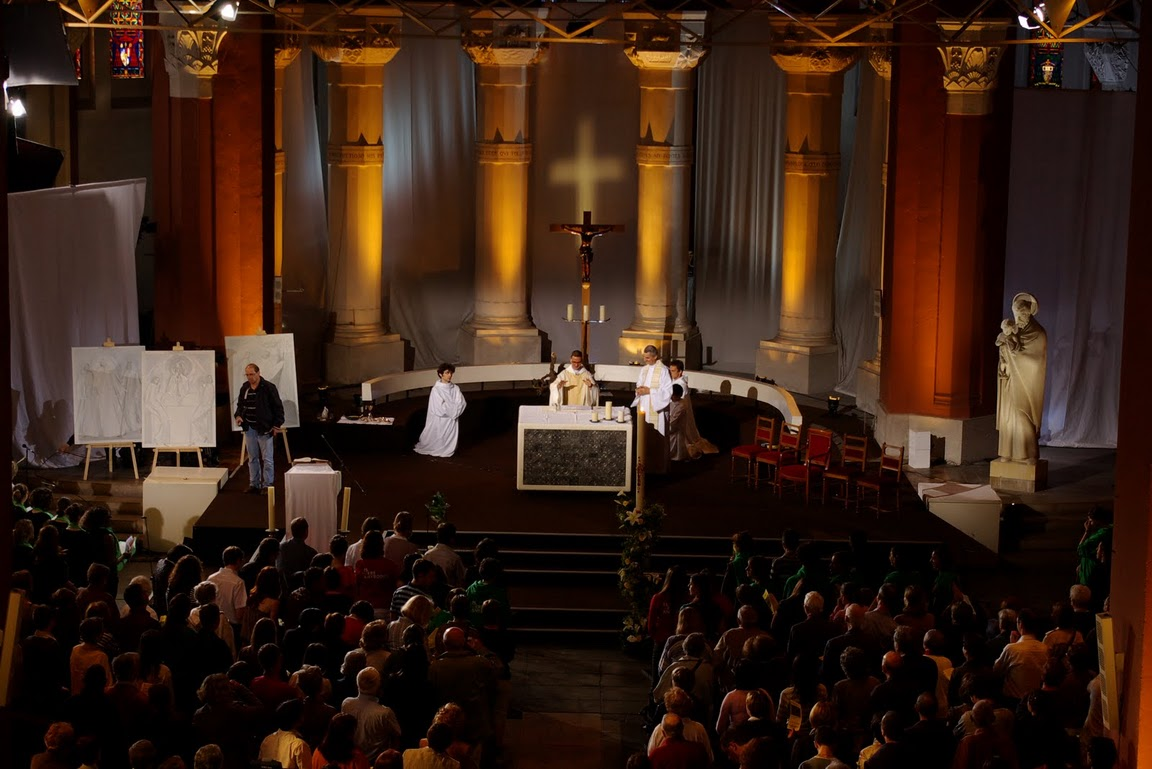 Messe télévisée dans la basilique Saint-Joseph de Grenoble, animée par Isèreanybody?, la pastorale des jeunes du diocèse catholique de Grenoble-Vienne